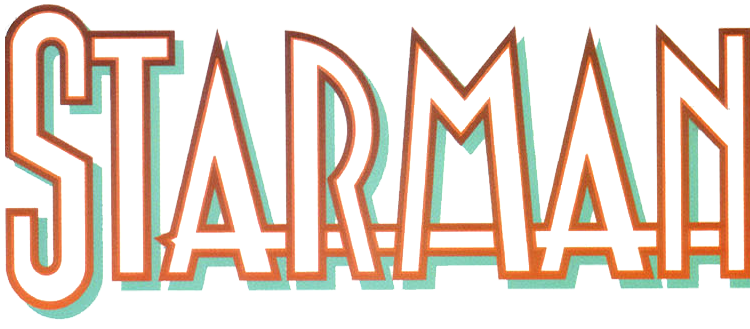 Versão simplificada do logotipo da série Starman, mantendo apenas as palavras e omitindo a estrela